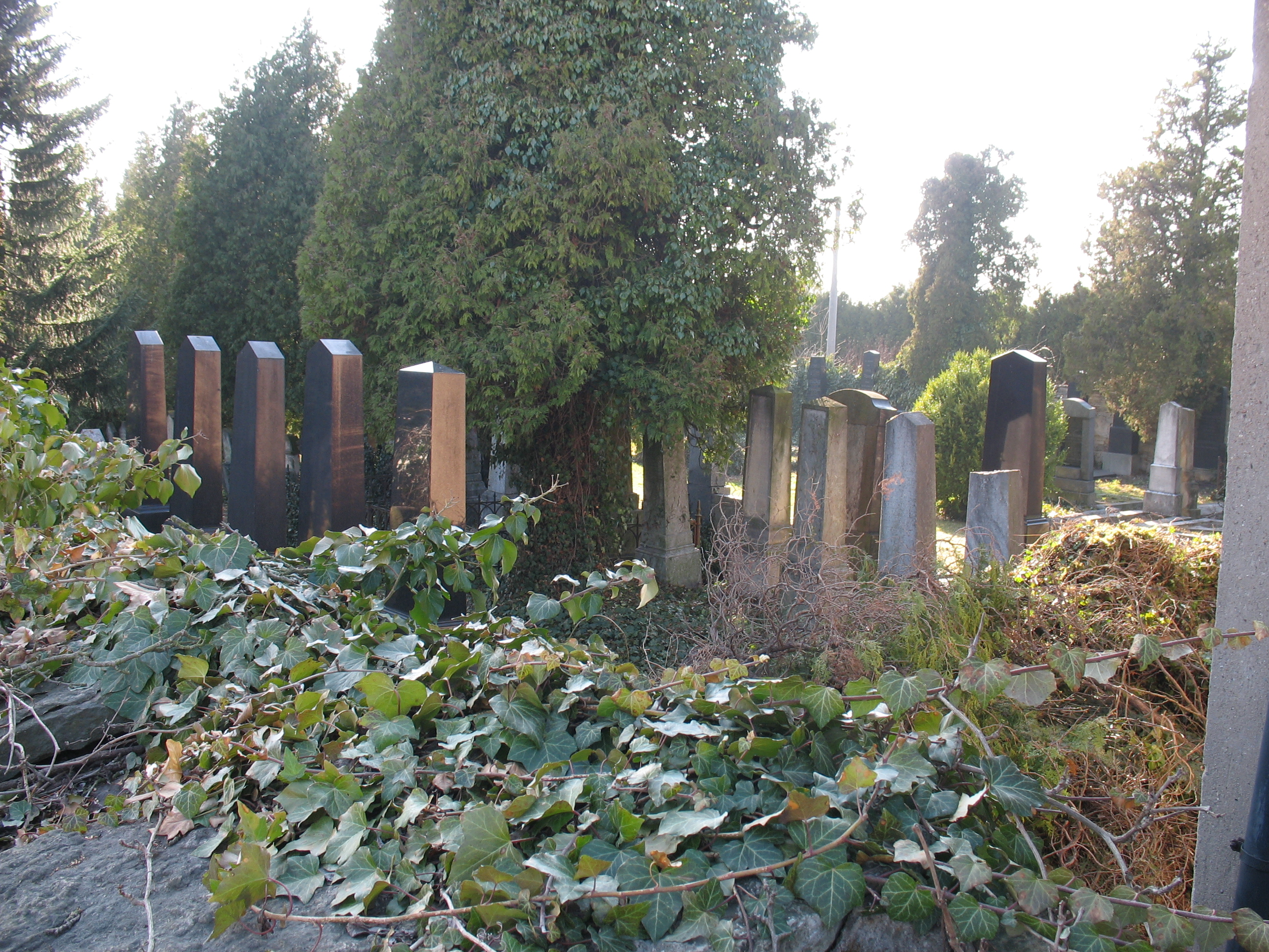 Židovský hřbitov v Dobrušce. Foto: O. Mejsnar